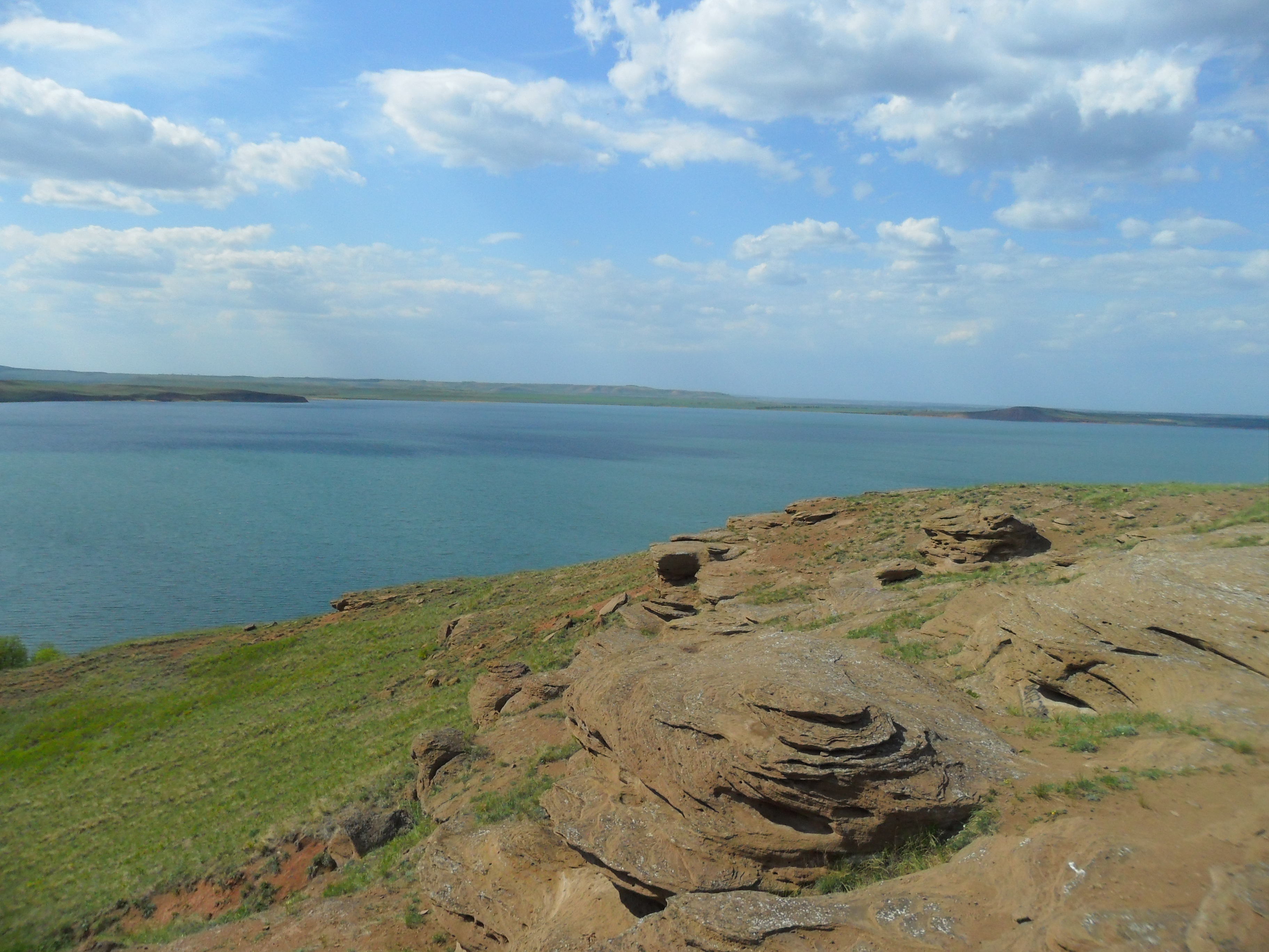 Аслы-Куль, Давлекановский район This image is related to the protected area of Russia number 0210115